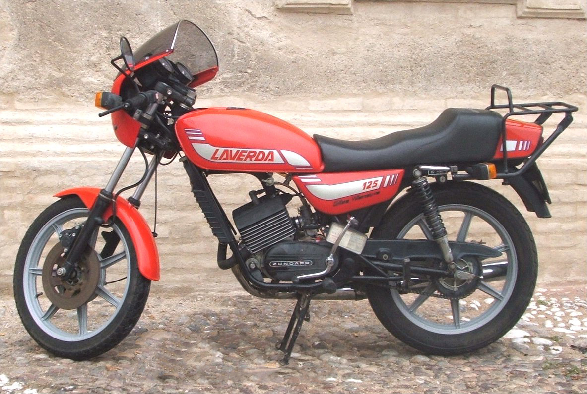 Laverda 125 LZ del 1983 fotografato al Raduno Moto Storiche di Medole nel 2007